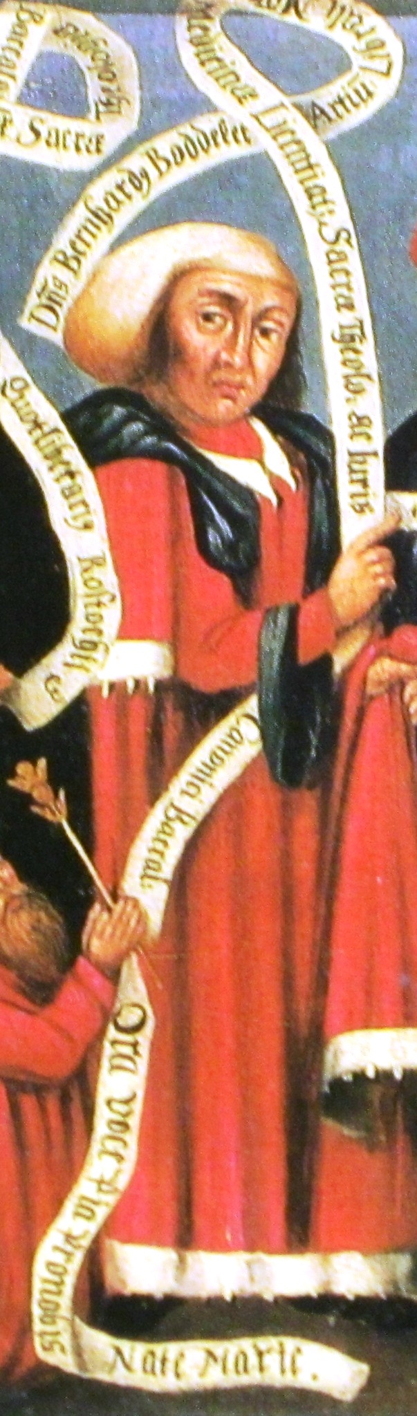 Bildnis Bernhard Bodeker. Ausschnitt aus einer Kopie der Rubenow-Tafel